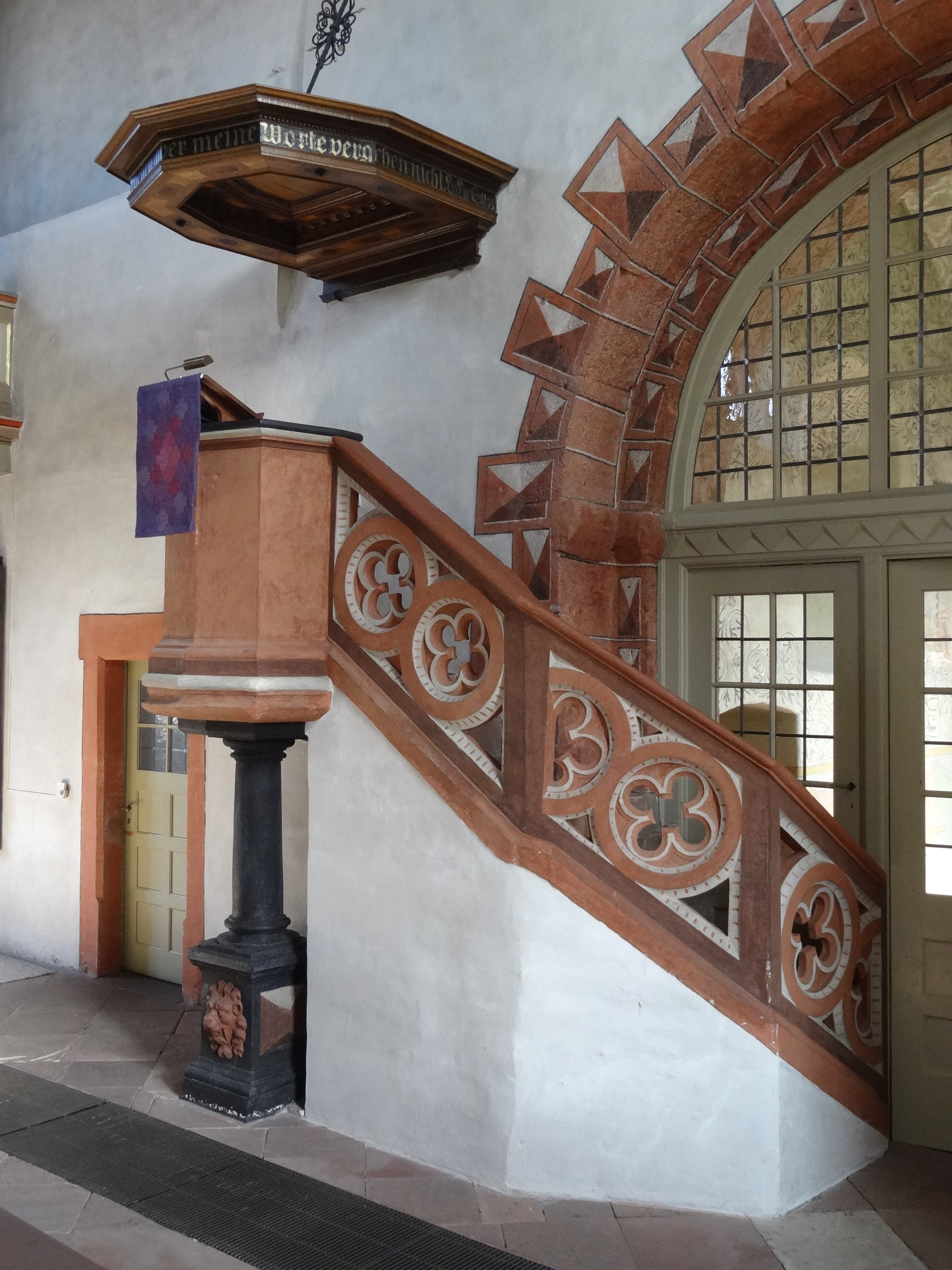 Evangelische Stadtkirche Hungen